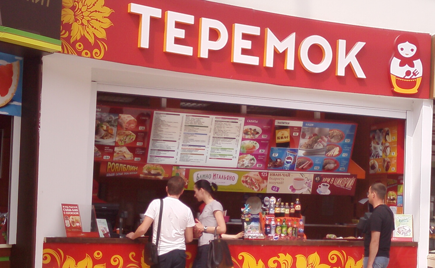 «Теремок» в торговом центре «БУМ» в районе станции метро «Братиславская» в Москве. Фотография сделана в июле 2012 года.